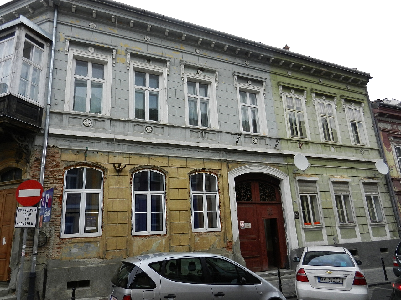 Casă monument istoric